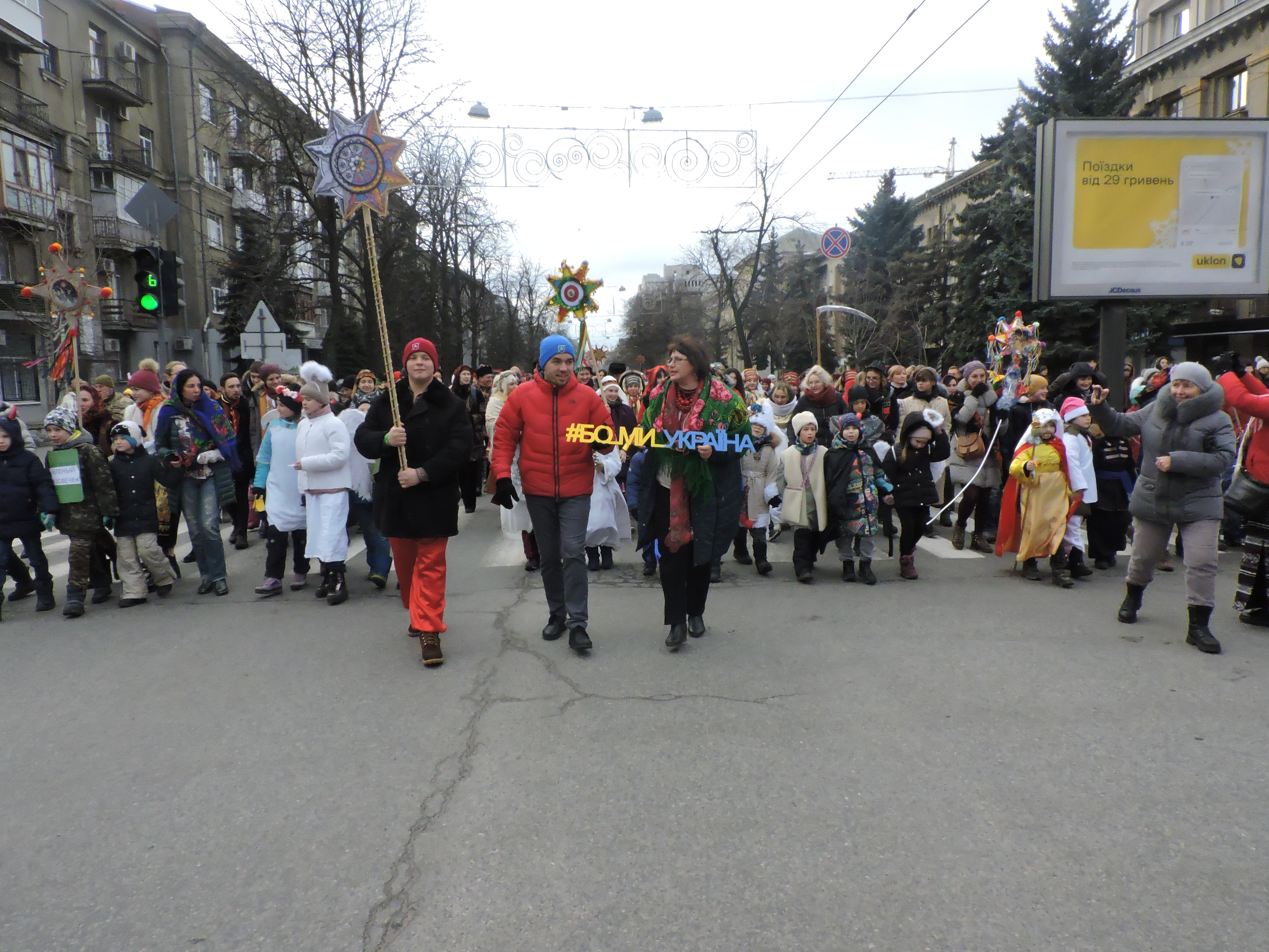 Вертепна хода вулицею Сумською від майдану Свободи до Головної сцени фестивалю в Центральному парку культури і відпочинку імені Максима Горького в рамках «Вертеп-фесту 2020».м. Харків, 12 січня 2020 року.На передньому плані: Роман Тичківський (керівник Української академії лідерства) та Олена Рофе-Бекетова (координаторка «Вертеп-фесту 2020»)